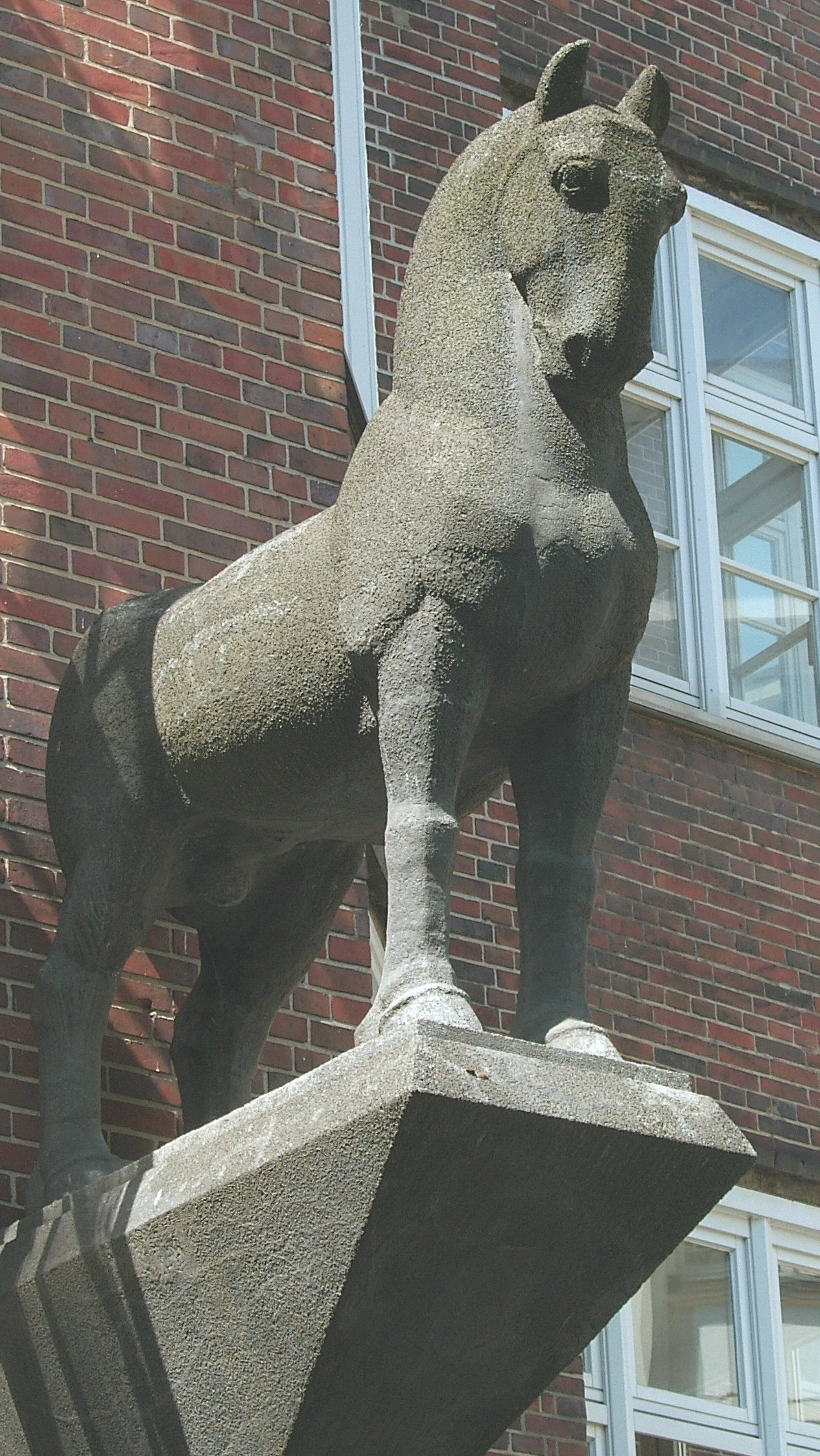 Hamburg, Innenstadt, Pferd am Thaliahof, Bildhauer Ludwig Kunstmann 1921/22